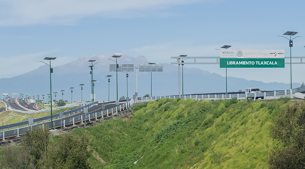 Libramiento de la Ciudad de Tlaxcala en el entronque con la Carretera Federal 121